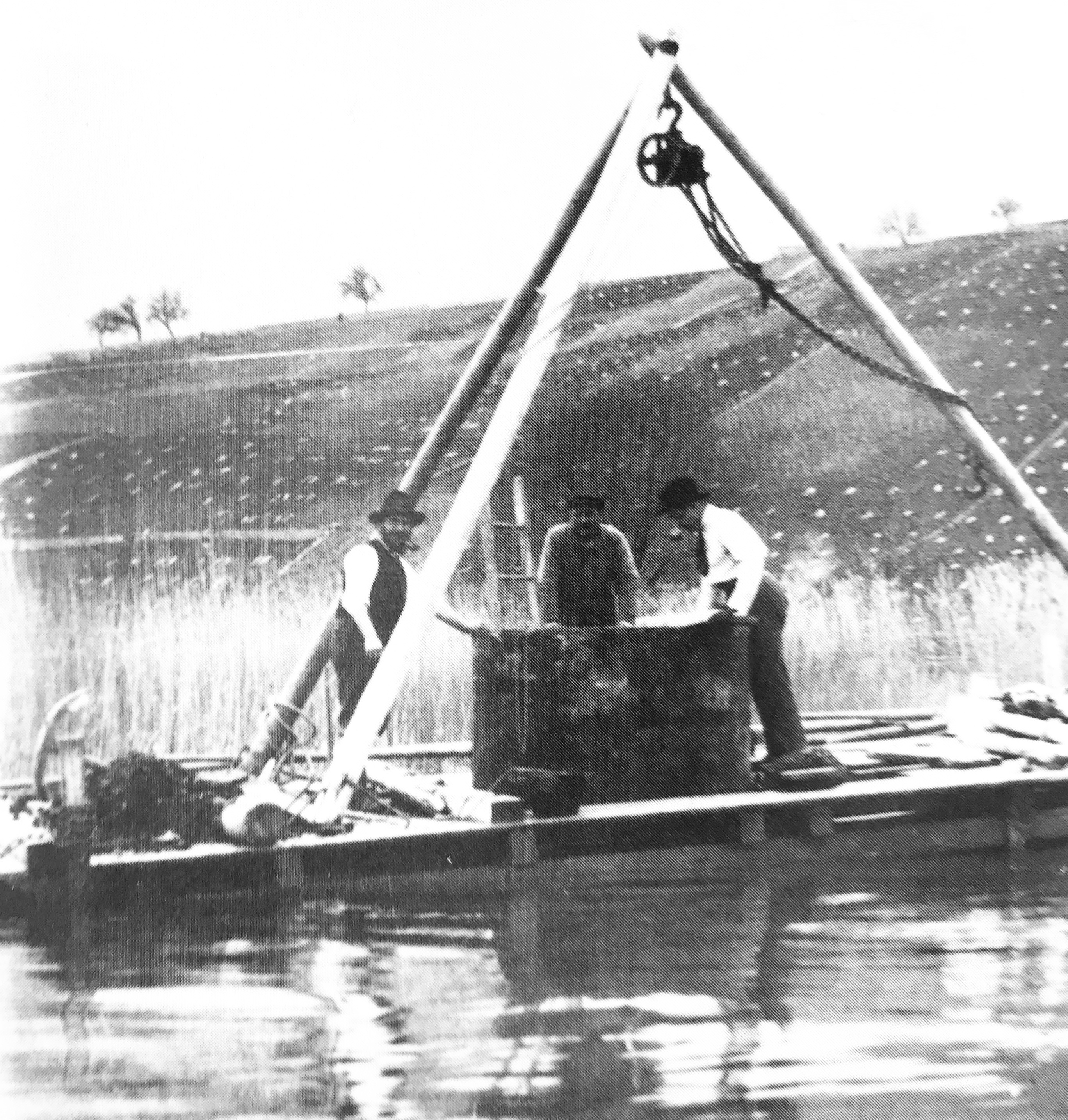 Photographie de la "virole" mise au point par Paul Vouga pour effectuer ses sondages archéologiques subaquatiques en 1925. Tiré de ARNOLD B. 1986 : Cortaillod-Est, un village du Bronze final 1, fouille subaquatique et photographie aérienne Ed. du Ruau, Saint-Blaise. p. 20